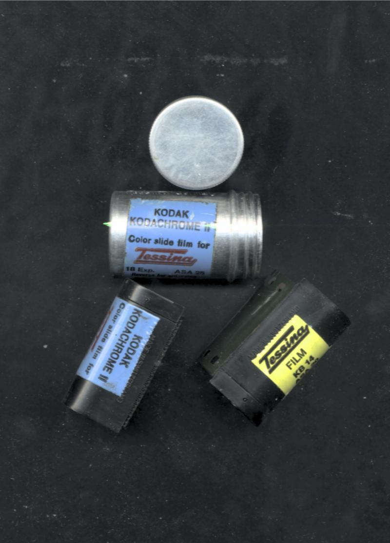 Tessina film,cassette and can